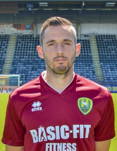 Robert Zwinkels